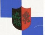 Bandeira_de_cacimba_de_dentro.jpg